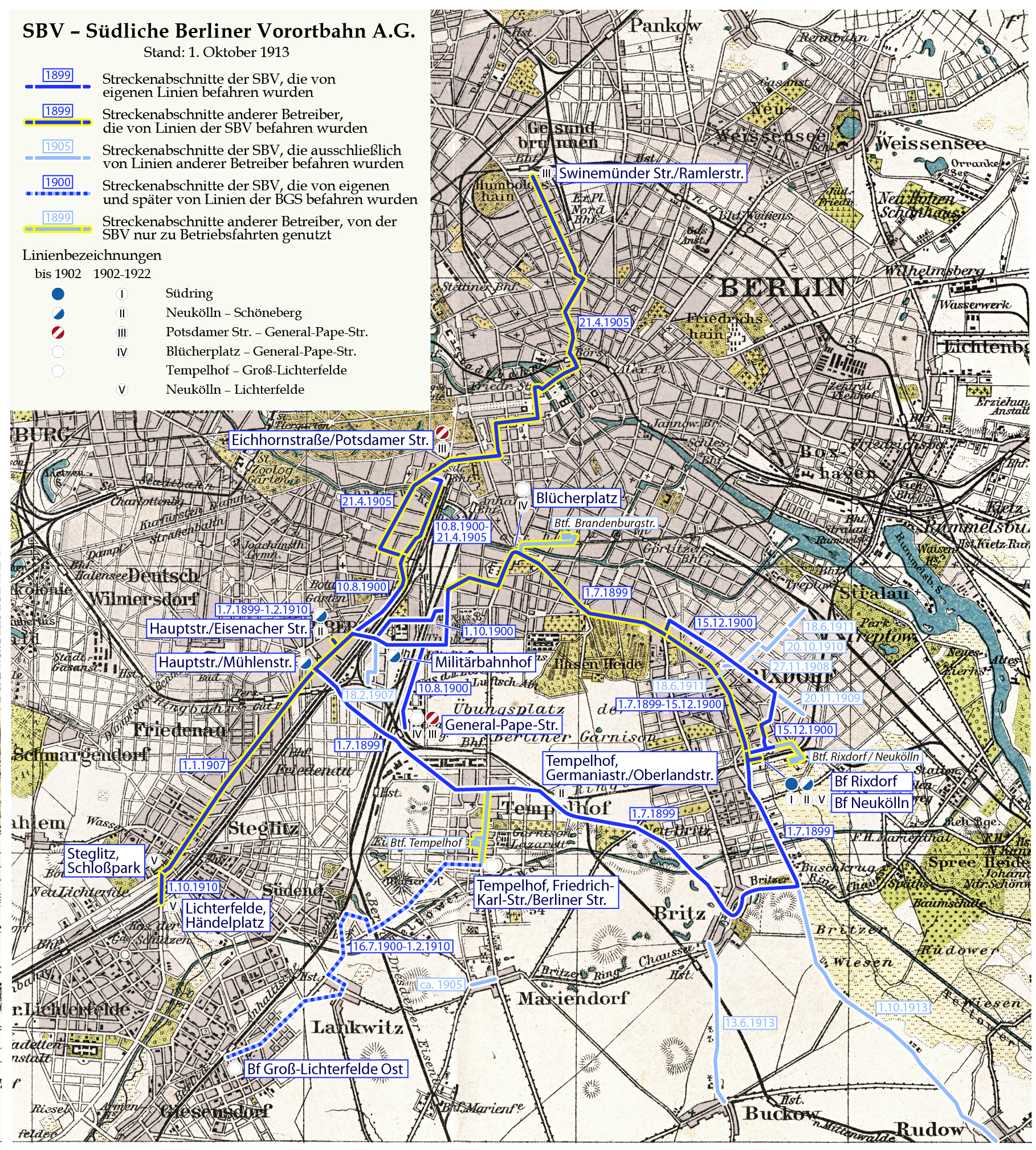 Karte der Südlichen Berliner Vorortbahn (SBV)